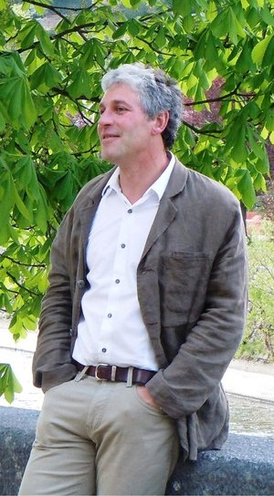 Paul Furlan